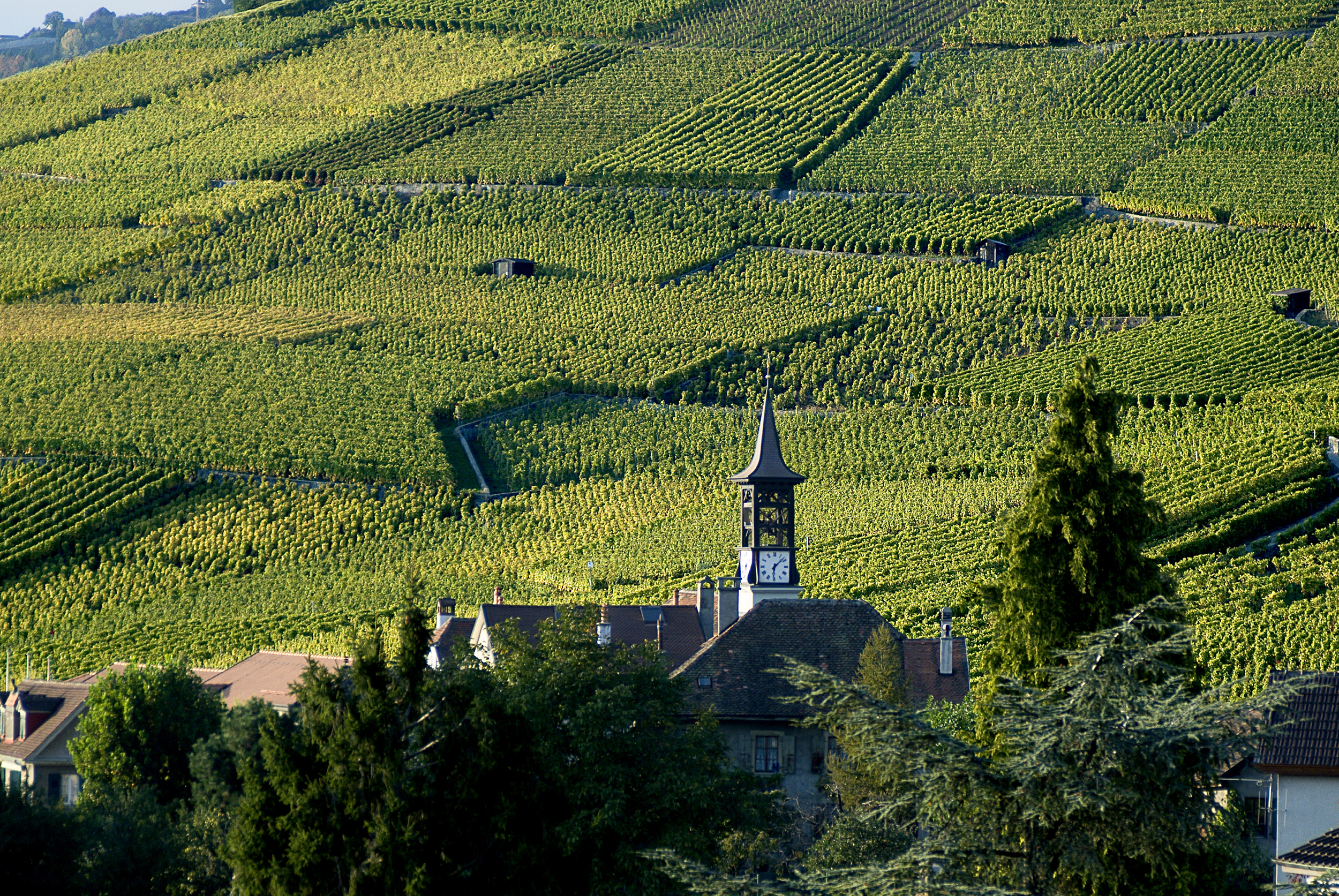 Lavaux Vineyard Terraces, Soleil couchant, mois d'octobre, fin des vendanges.